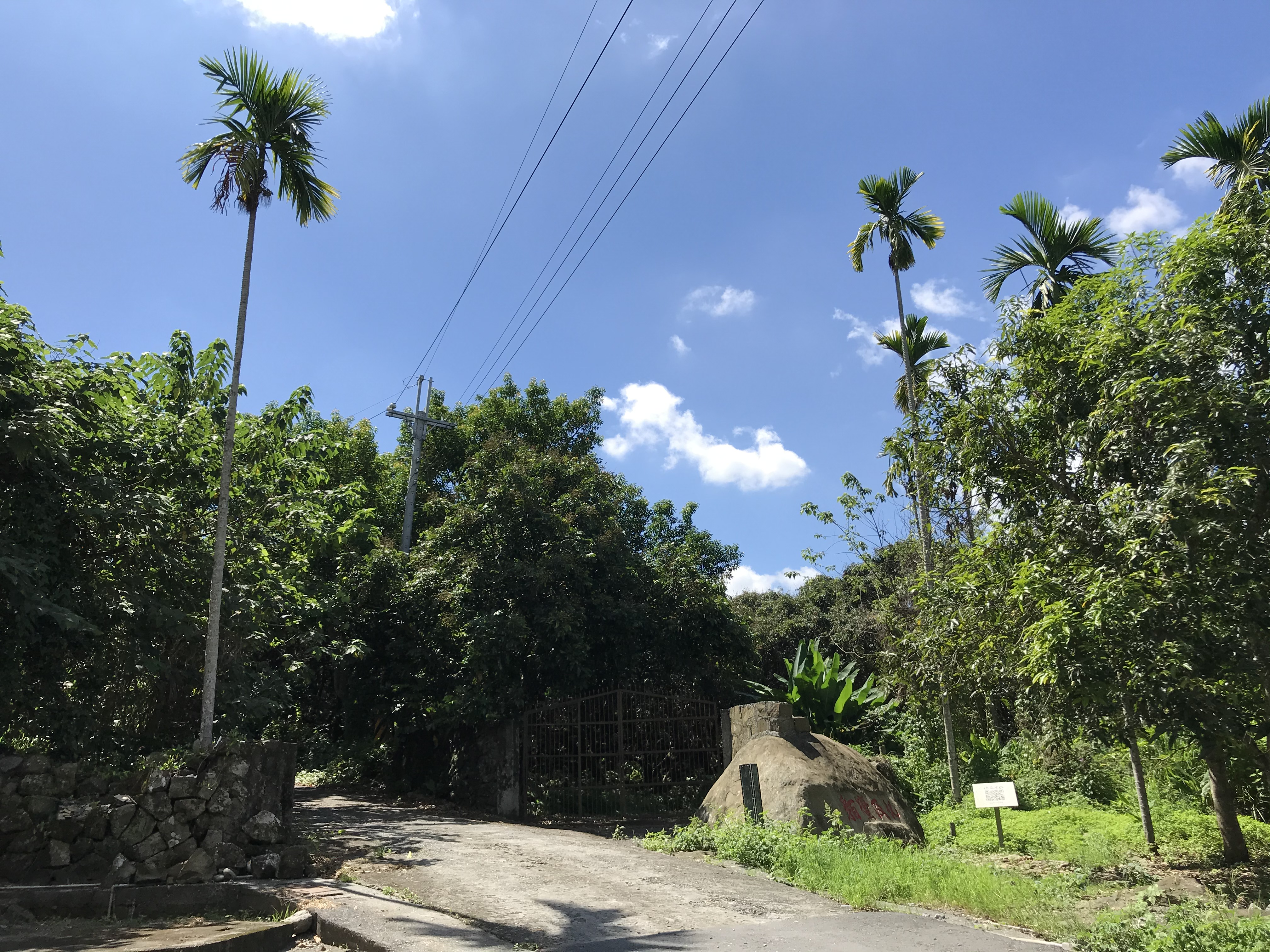 中文（台灣）: 化及蠻貊碣遠景